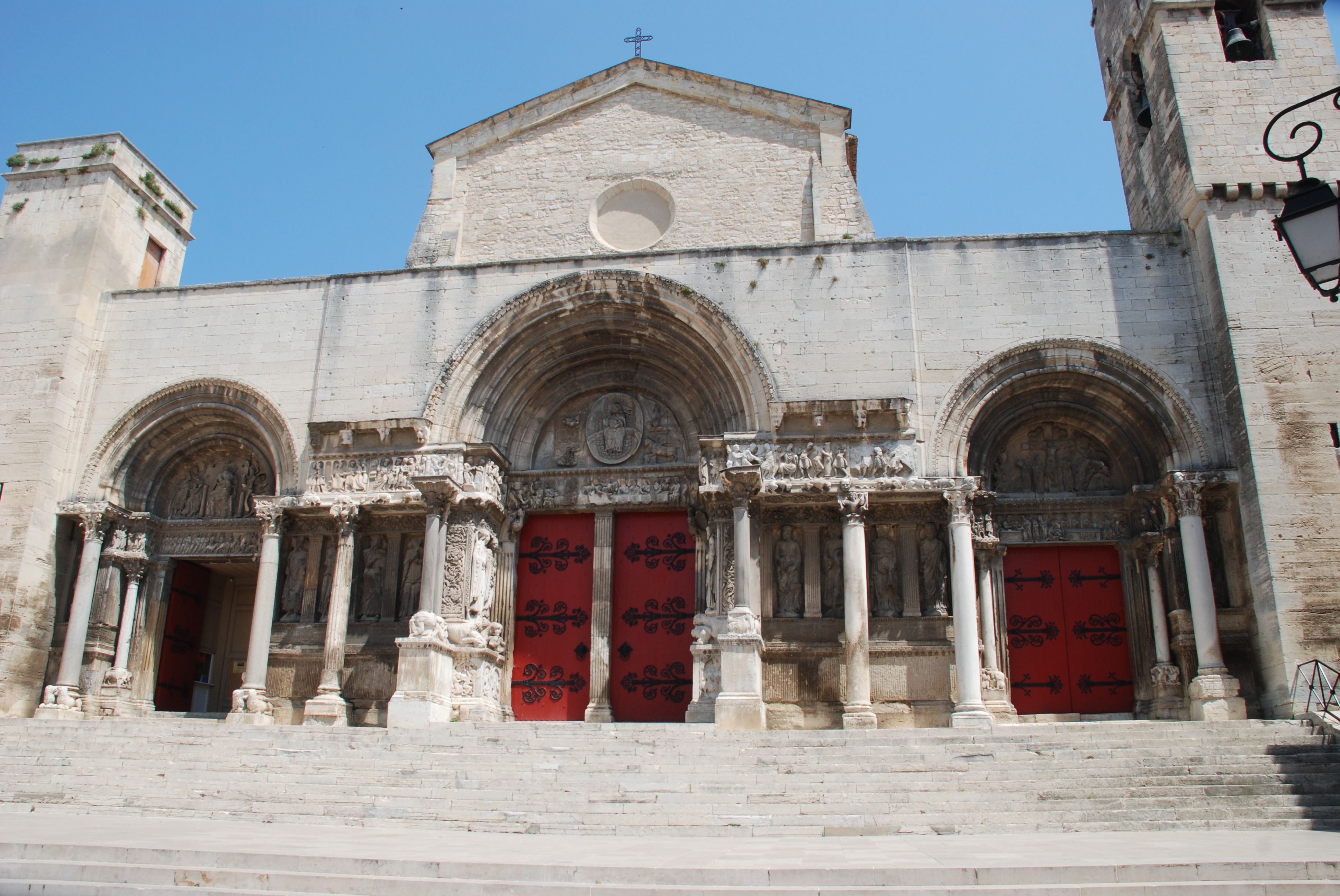 France - Gard - Abbaye de Saint-Gilles : porche à l'antique